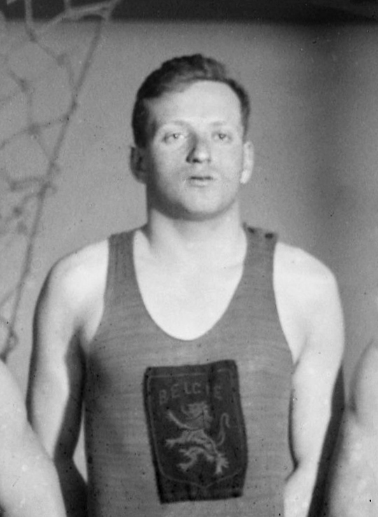 30-12-22, match France-Belgique, équipe de relais belge Gérard Blitz: [photographie de presse] / [Agence Rol]